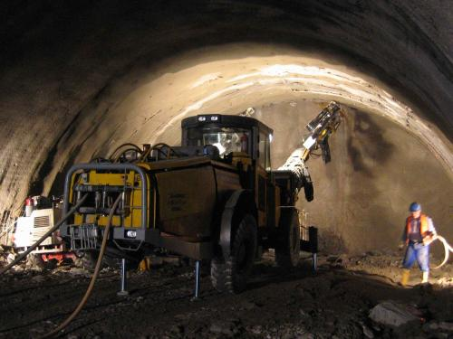 Bauarbeiten im Zuge des Schlossbergtunnels